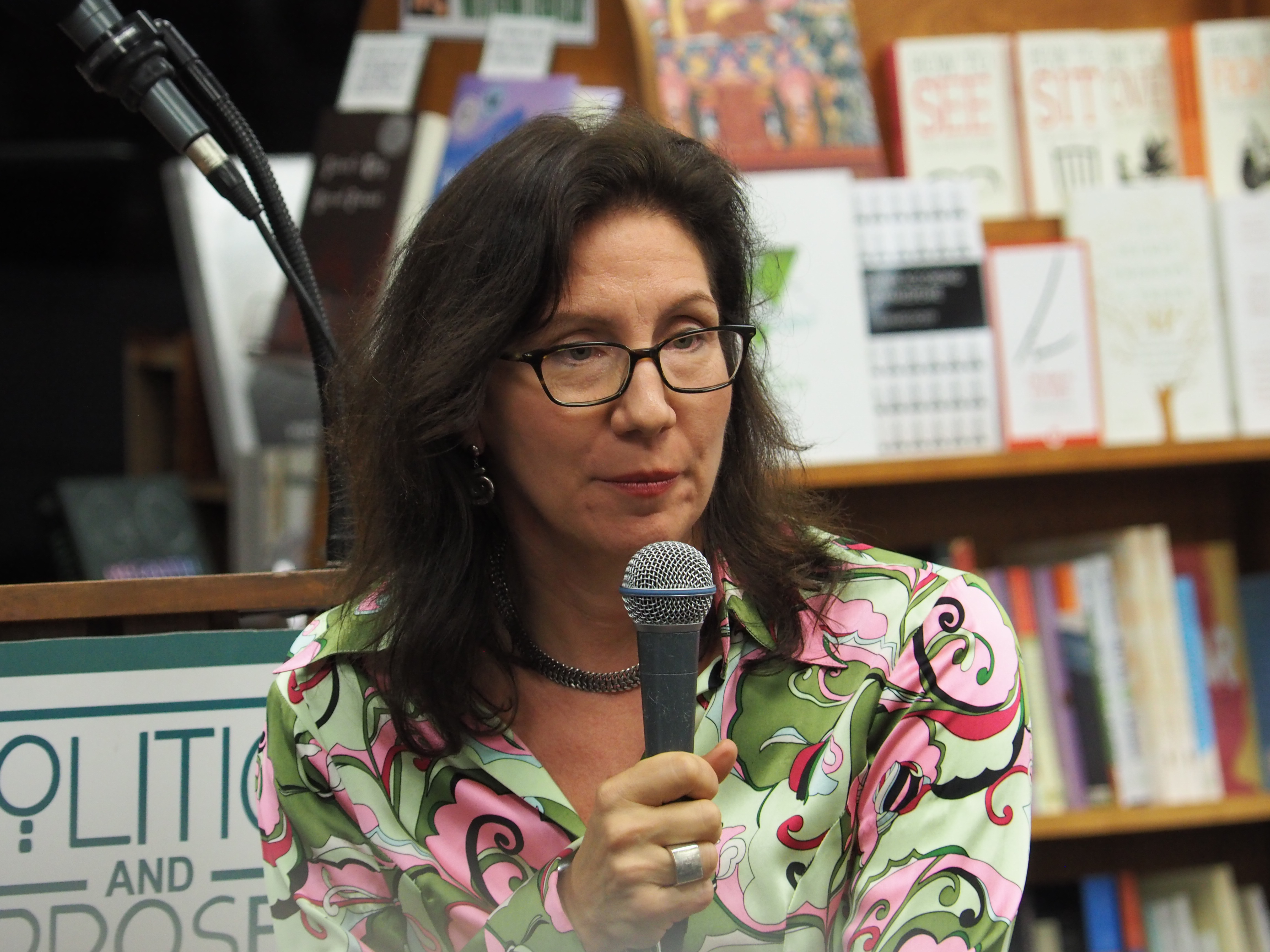 Jennifer S. Hirsch